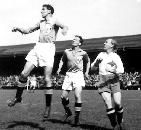 Sture Mårtenssom Malmö FF i en allsvensk match mot IFK Göteborg på Gamla Ullevi 1945.